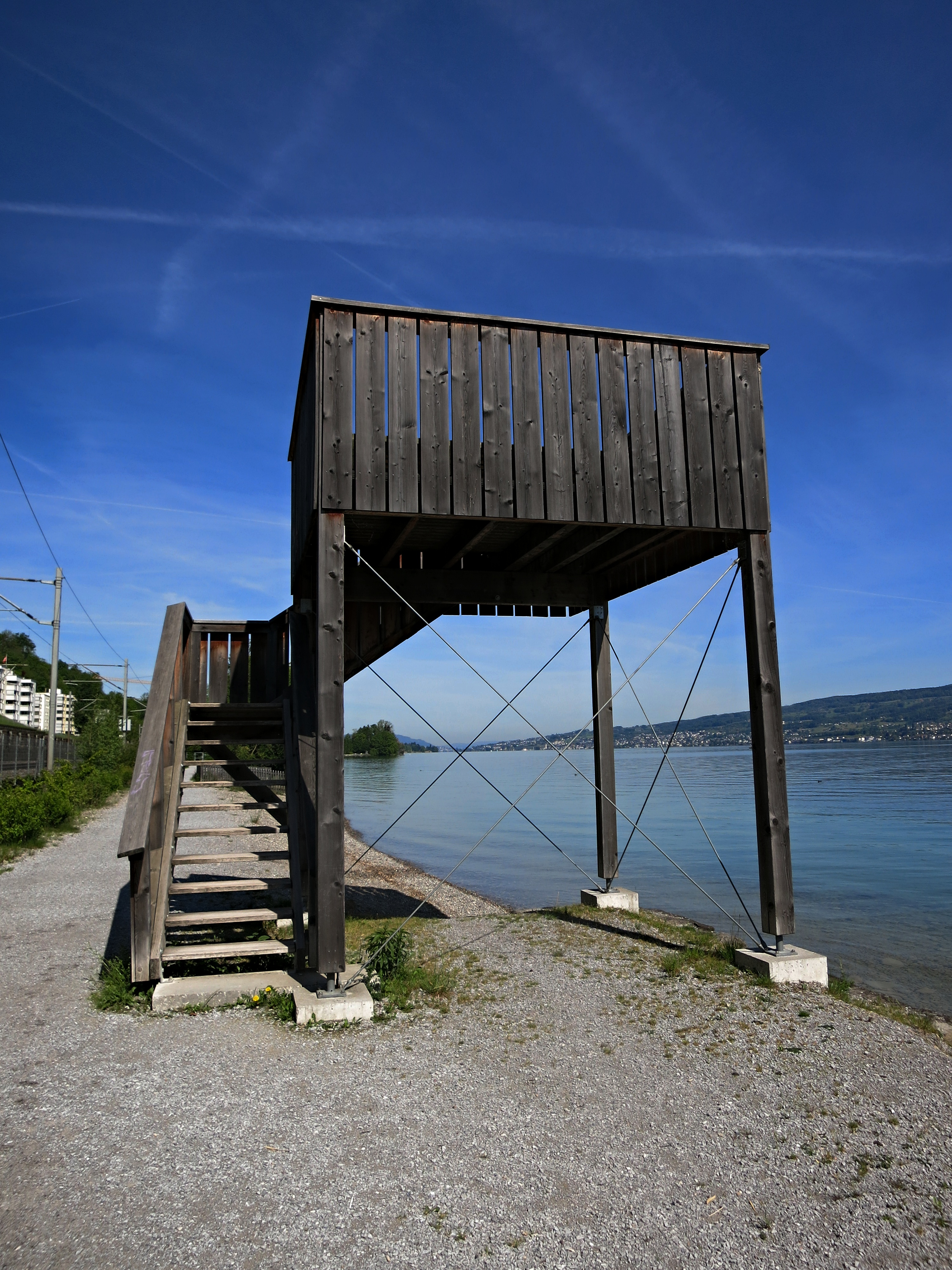 Uferturm, Richterswil